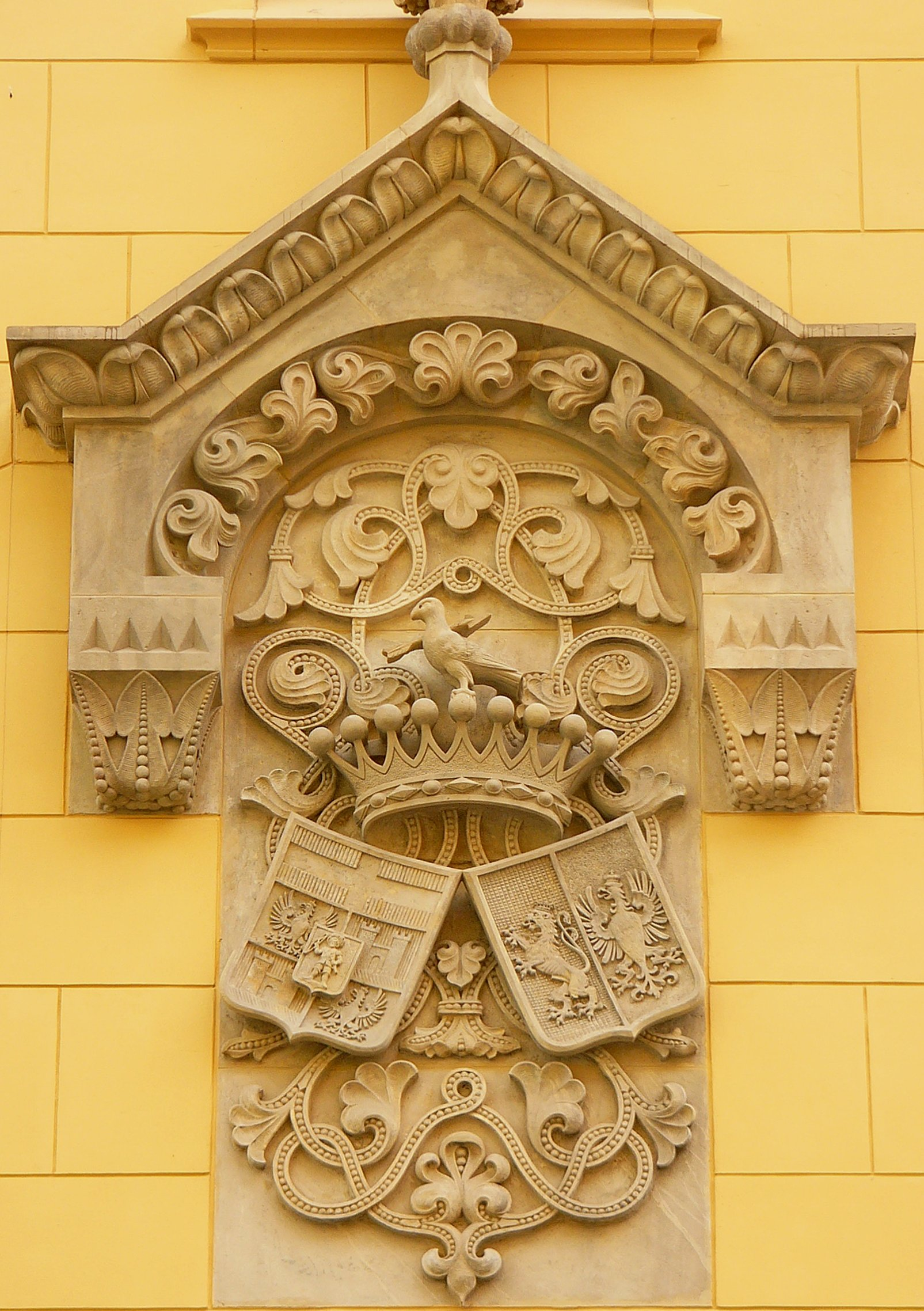 In der Wlodkowica-Str. 8 steht das ehemalige Palast des Grafen von Ballestrem. Das Wappen befindet sich an der Fassade des Gebäudes.